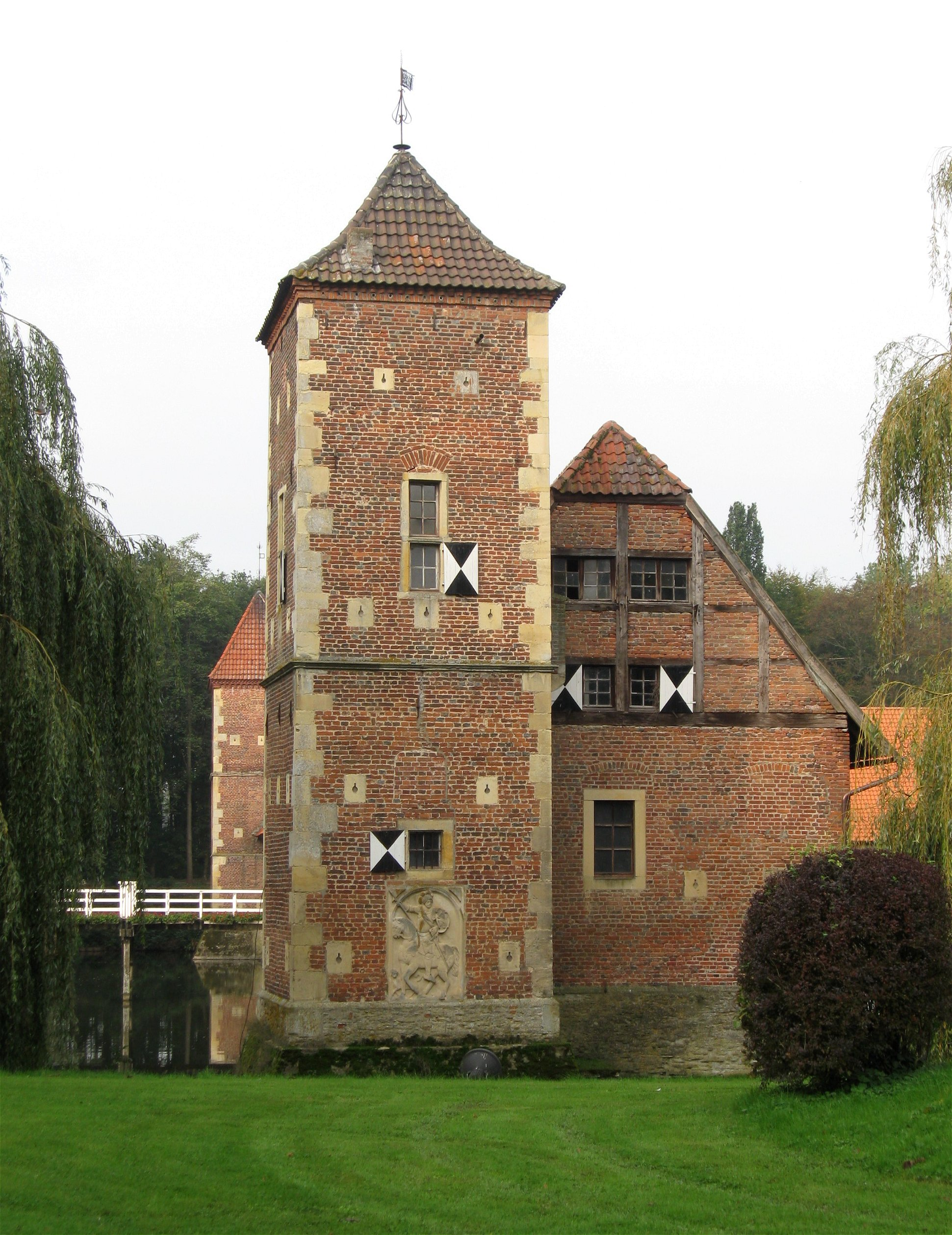 Burg Hülshoff, Havixbeck, Geburtshaus der Dichterin Annette von Droste-Hülshoff, Gärtnersturm von 1628 auf der Vorburg